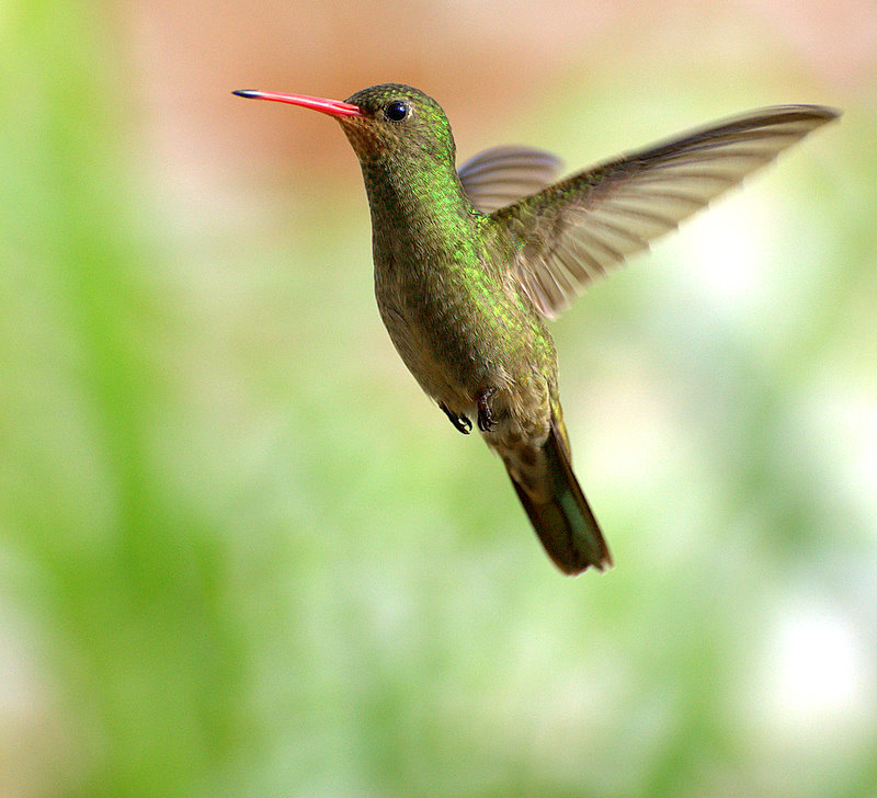 Gilded Hummingbird (Hylocharis chrysura) from São Paulo, Brazil. No quintal da casa dos meus pais na cidade de Piraju-SP